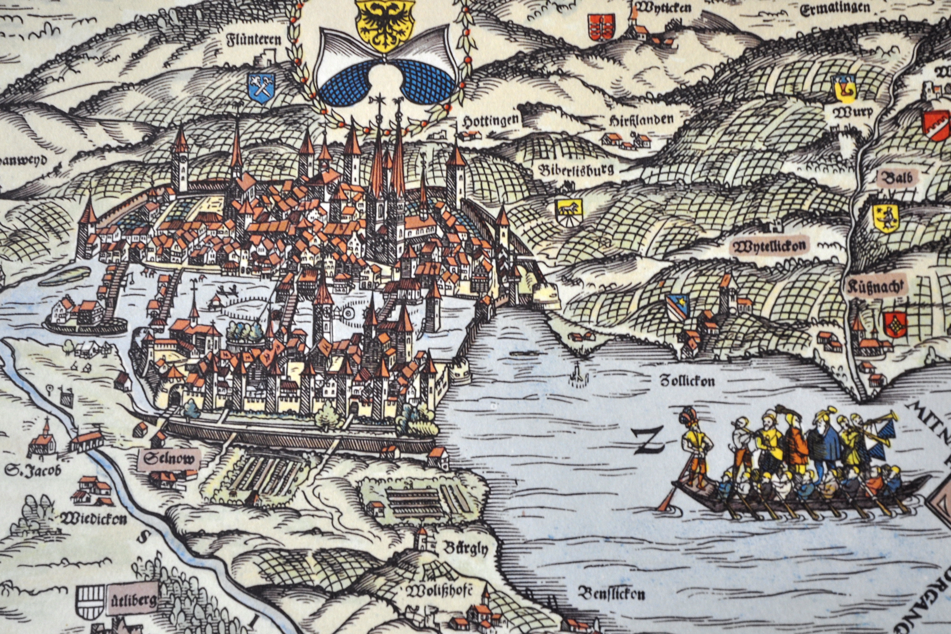 Karte des Zürcher Gebiets 1566, Zentralbibliothek in Zürich (Switzerland)